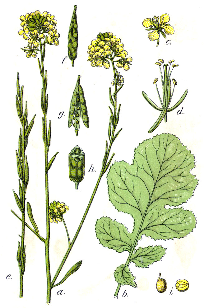 Brassica nigra (L.) K.Koch, syn. Crucifera sinapis (L.) E.H.L.Krause Original Caption Schwarzer Senf, Crucifera sinapis